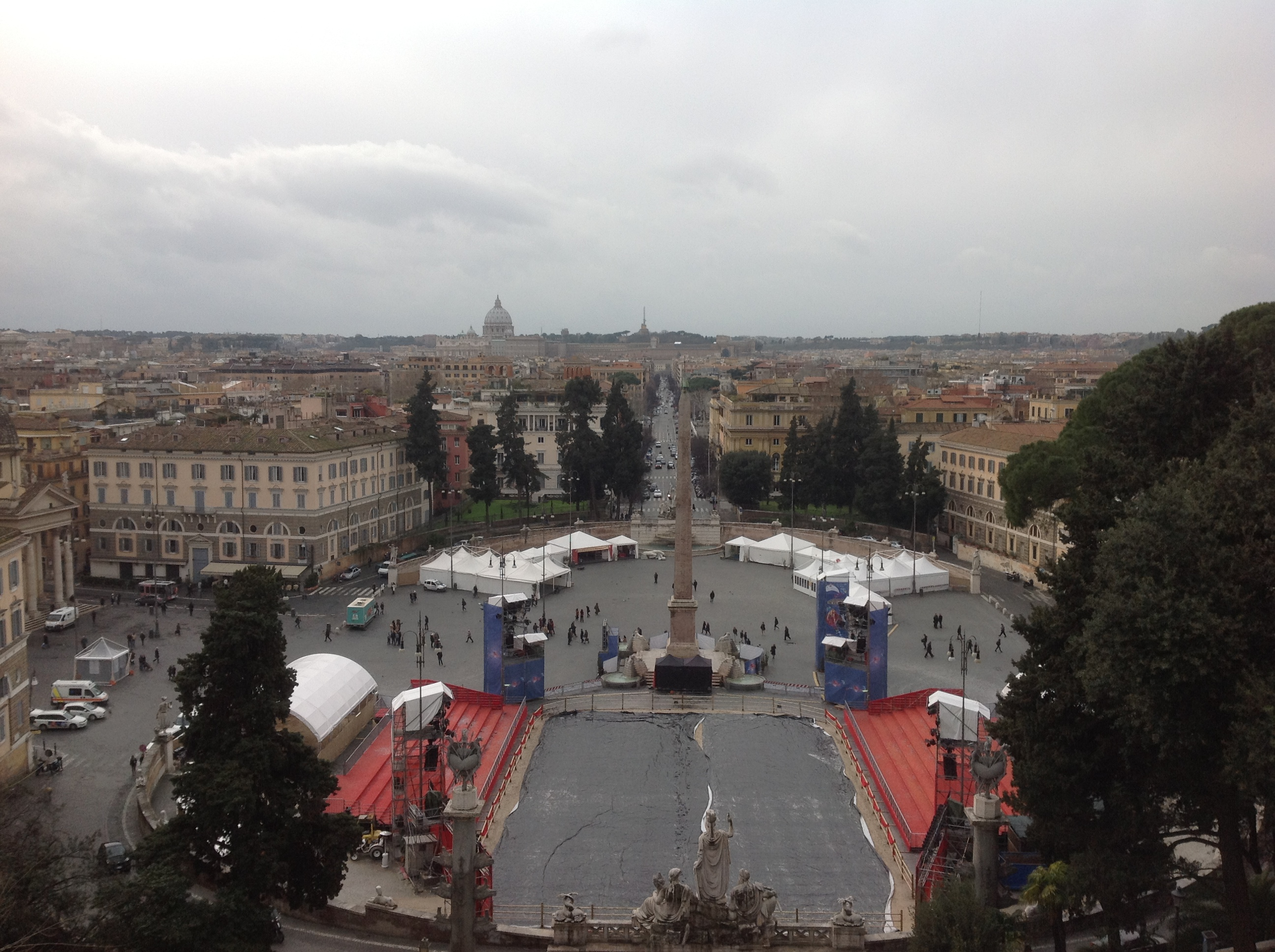 Piazza del Popolo